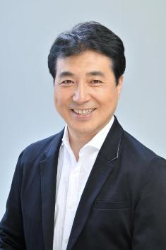 飯田哲也